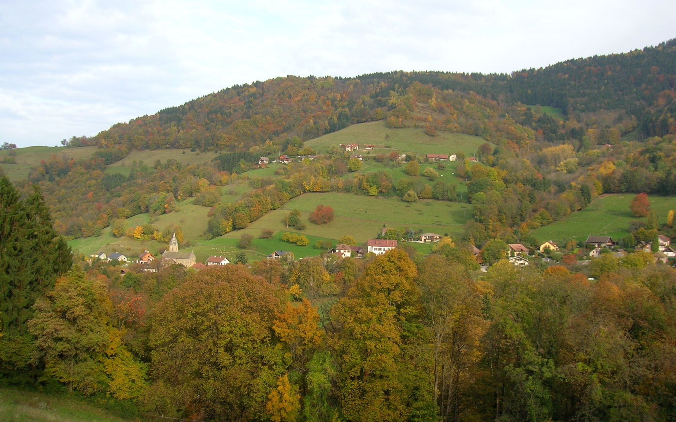 La Combe-de-Lancey, Isère, France. panorama sur La Chapelle, depuis la route entre Le Mas Vennier, Marche et le chateau de la Combe.